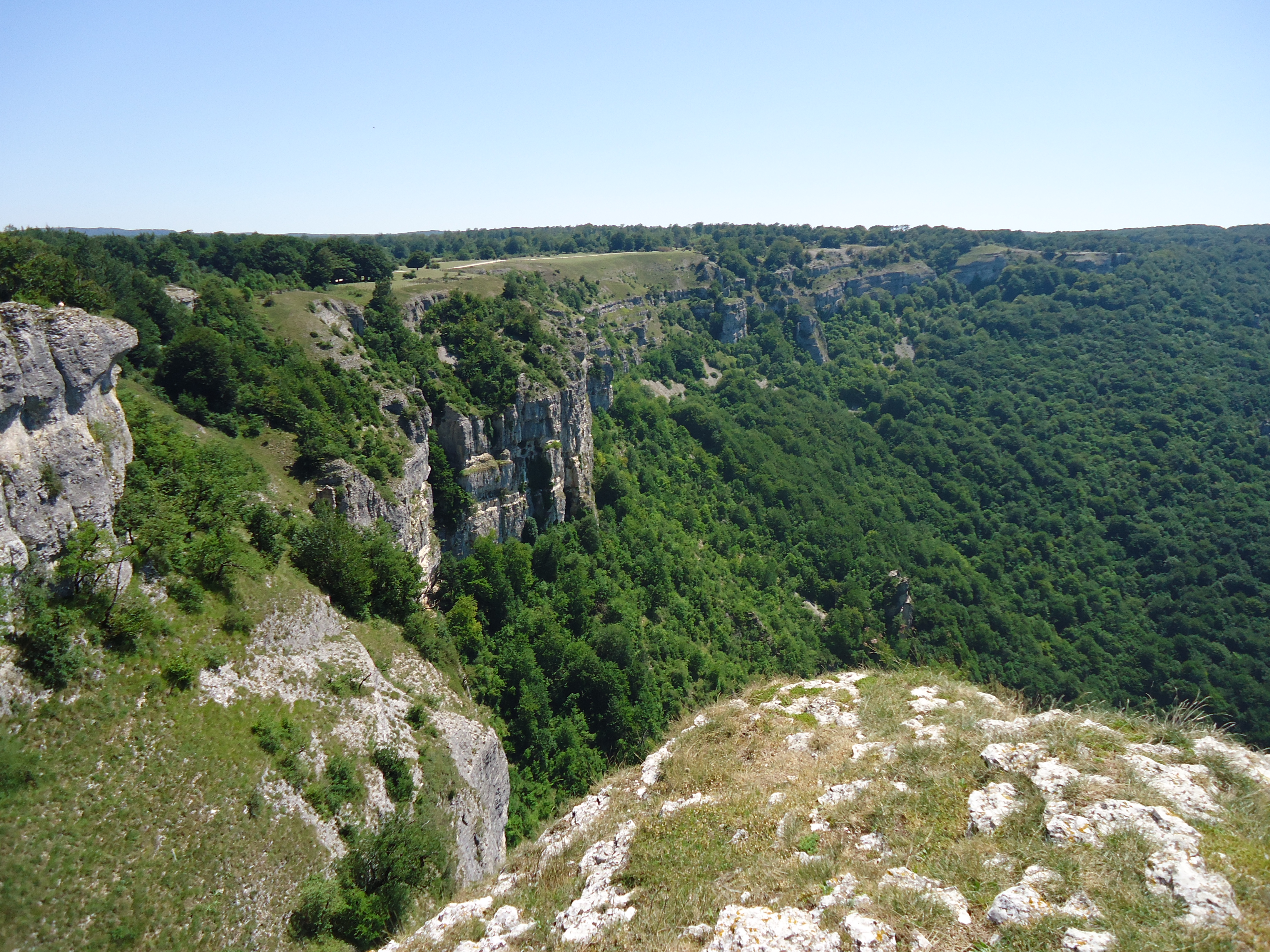 Ladera del "Balcón de Pilatos", Parque Natural Urbasa y AndiaEuskara: Ubabako amildegia, Urbasa eta Andiako Natur Parkea This is a photography of a Special Area of Conservation in Spain with the ID: ES2200021. Natura2000 entry, EEA entry